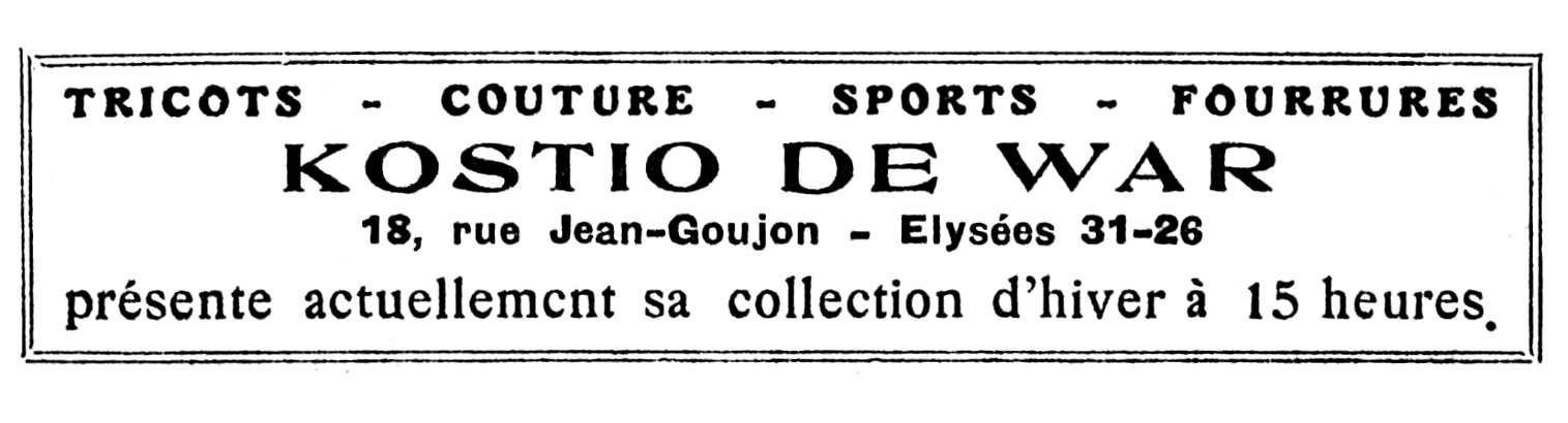 Anzeige des Modehauses Kostio de War in der Zeitung Le Figaro am 3. August 1935